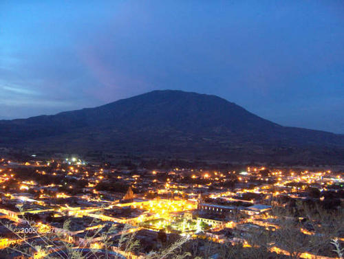 Ahuacatlán visto desde el gran cerro de la cruz